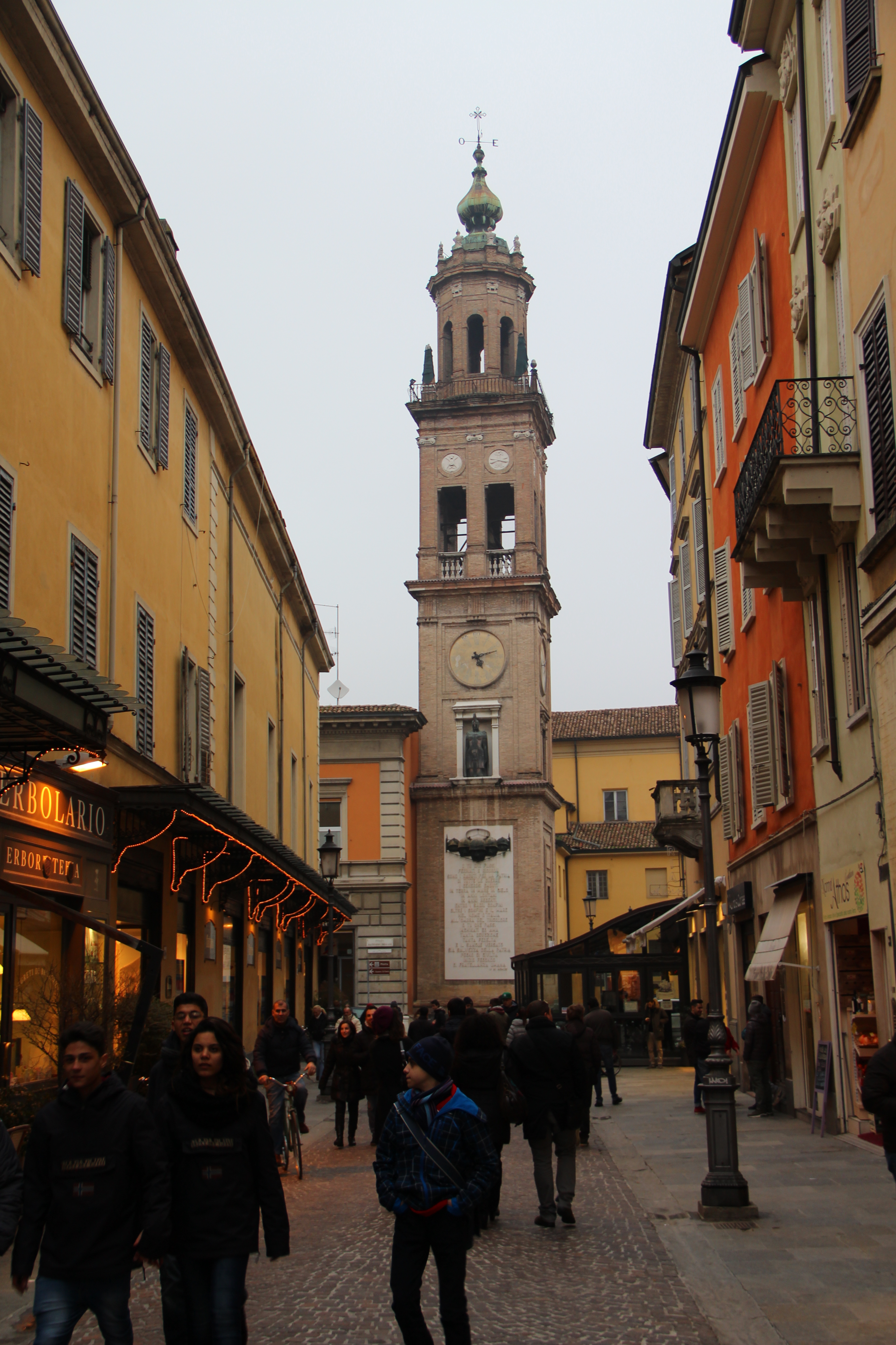 Parma, Kirchturm von San Paolo